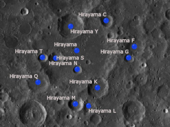 Cráter lunar Hirayama. Cráteres satélite. (Imagen LROC)